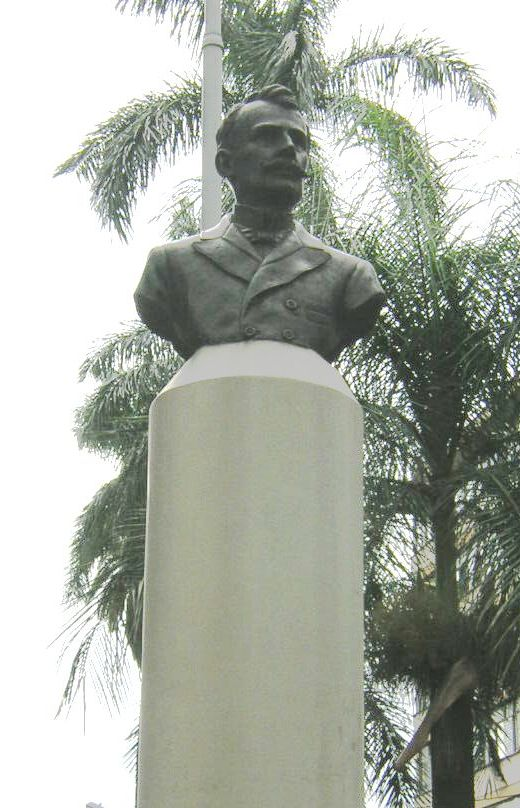 Busto de Rafael Uribe Uribe, ubicado en la Plazuela Uribe Uribe, Medellín, Colombia